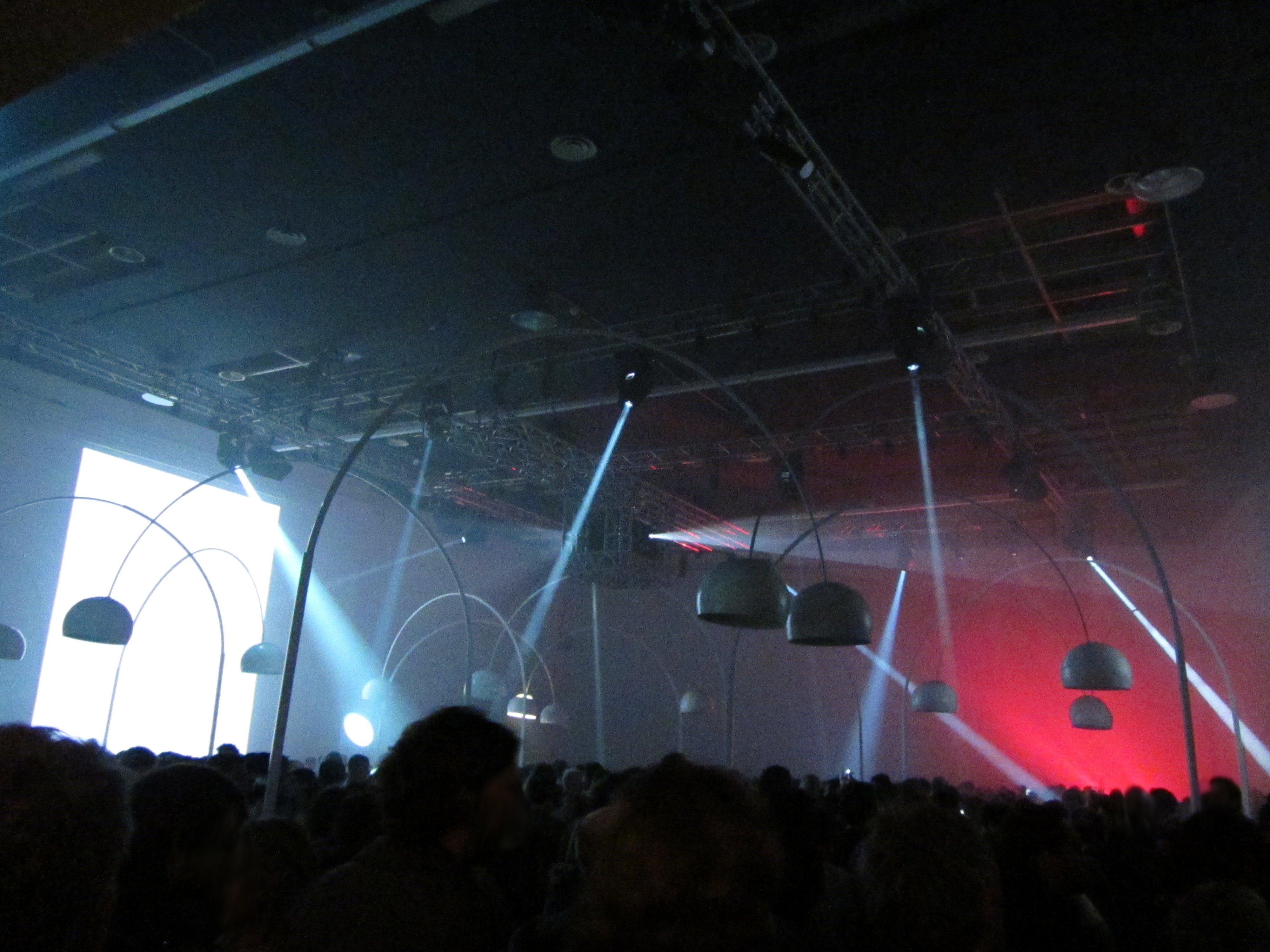 Festa dei 50 anni della FLOS Evento tenutosi durante il Fuorisalone 2012 (Milan Design Week) presso il Palazzo della Permanente a Milano in Italia. Evento chiuso (su invito) Open Bar, Dj set, catering ed esposizione di tutte le lampade FLOS (anche quelle fuori produzione) dal 1962 al 2012.